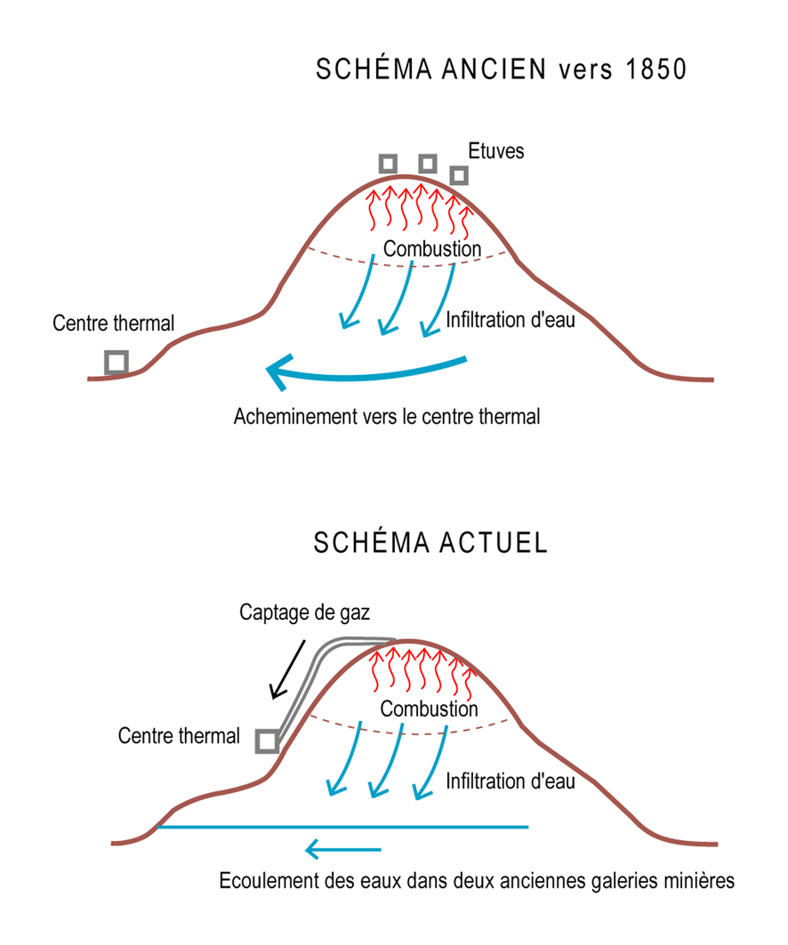 Schéma décrivant le mode de fonctionnement du thermalisme à Cransac (Aveyron).